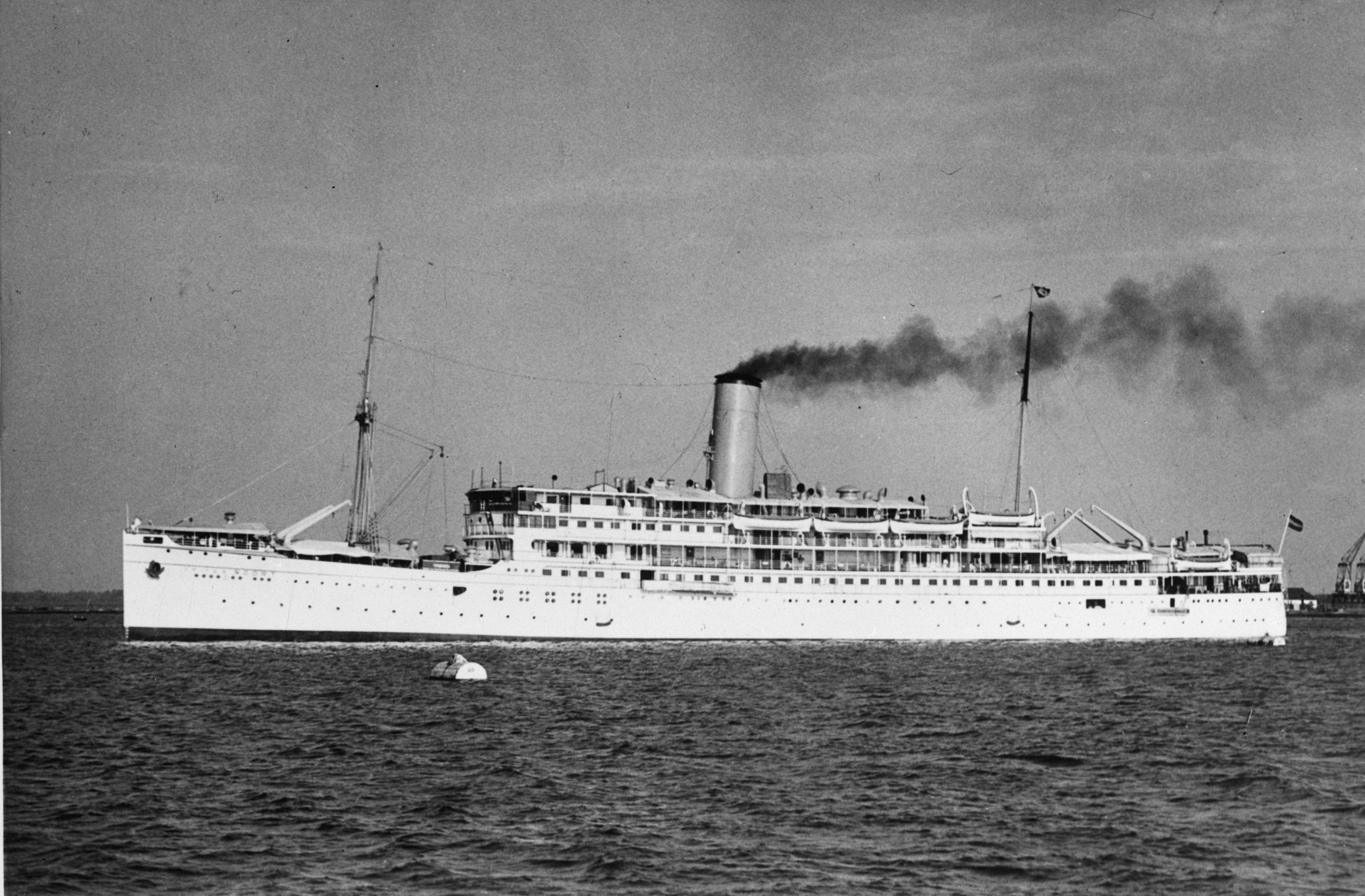 Collectie / Archief : Fotocollectie Anefo Reportage / Serie : MN [Merchant Navy] / Anefo Londen serie Beschrijving : S.S. "Op ten Noort" van de KPM Annotatie : Repronegatief. In 1941 omgebouwd tot hospitaalschip, in 1942 door de Japanners buitgemaakt en omgedoopt tot hospitaalschip Tenno Maru, 1944 hernoemd Hikawa Maru, door de Japanners na de capitulatie tot zinken gebracht. Datum : ongedateerd Trefwoorden : koopvaardijvloten, marine, passagiersschepen, tweede wereldoorlog Fotograaf : Onbekend / Publiek Domein Auteursrechthebbende : Nationaal Archief Materiaalsoort : Negatief (zwart/wit) Nummer archiefinventaris : bekijk toegang 2.24.01.04 Bestanddeelnummer : 935-3124